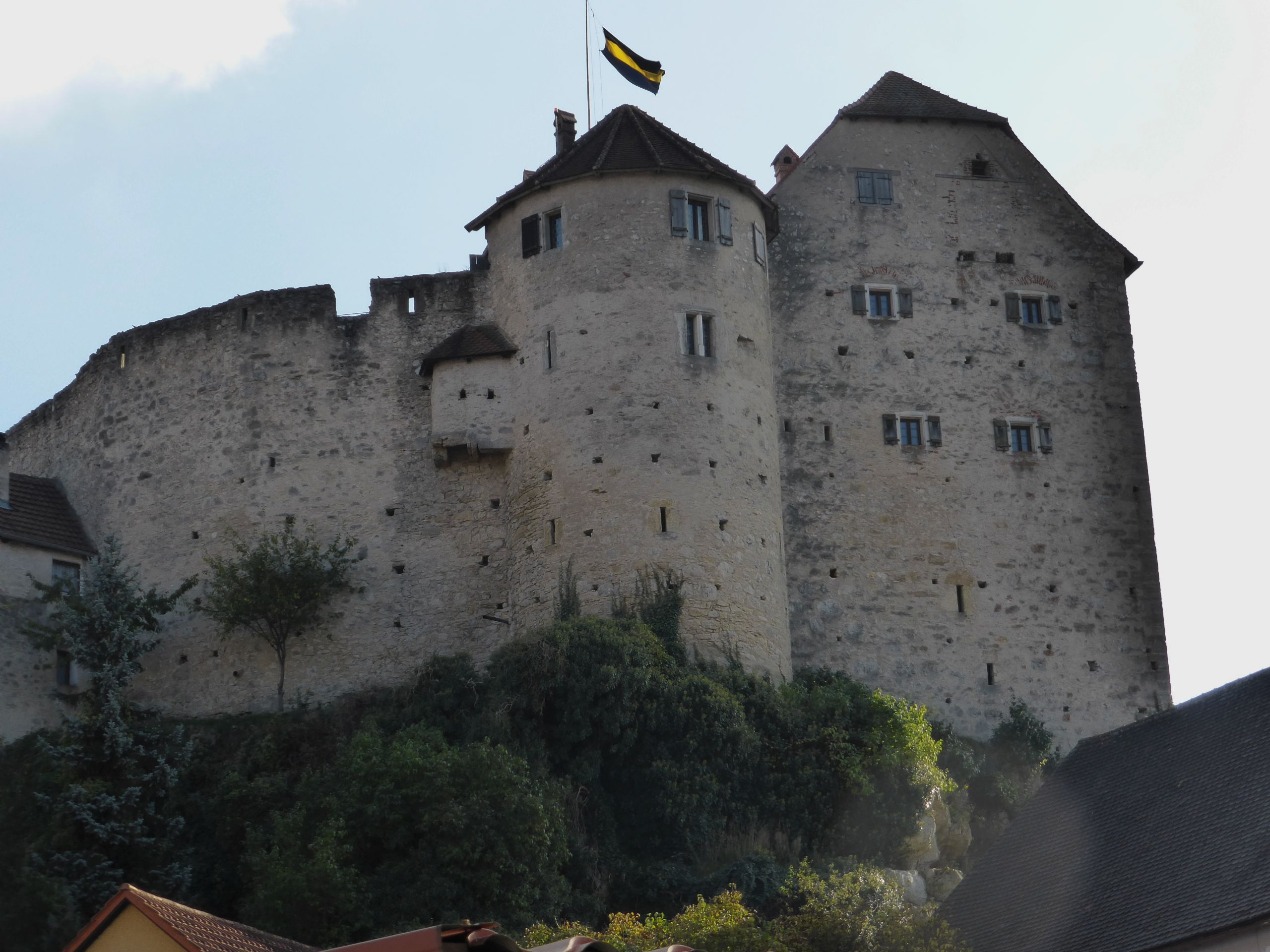 Wolfsegg (Hohenwarth)